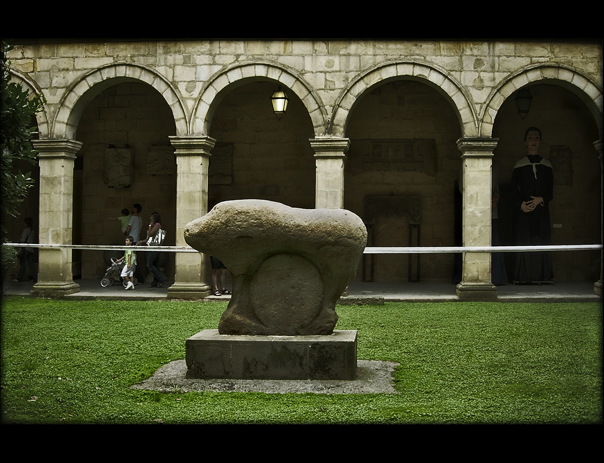 El ídolo de Mikeldi es un toro o jabalí, de entre los siglos VI y IV a.C. en cuyo vientre se puede ver un disco con el sol y la luna, se encuentra en el Museo Vasco/Euskal Museoa Bilbao (conocido anteriormente como Museo Arqueológico, Etnográfico e Histórico Vasco).